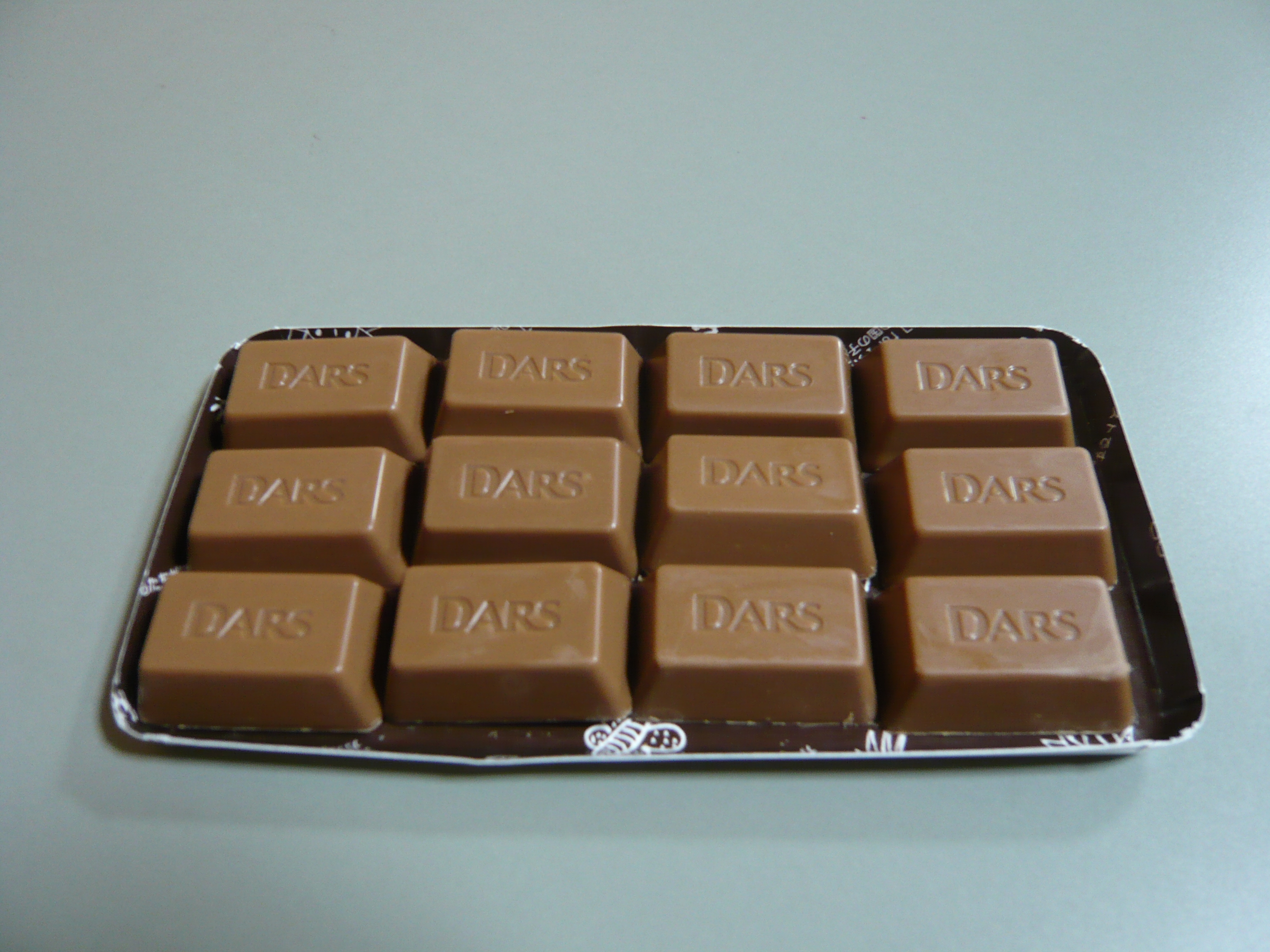 DARS中身